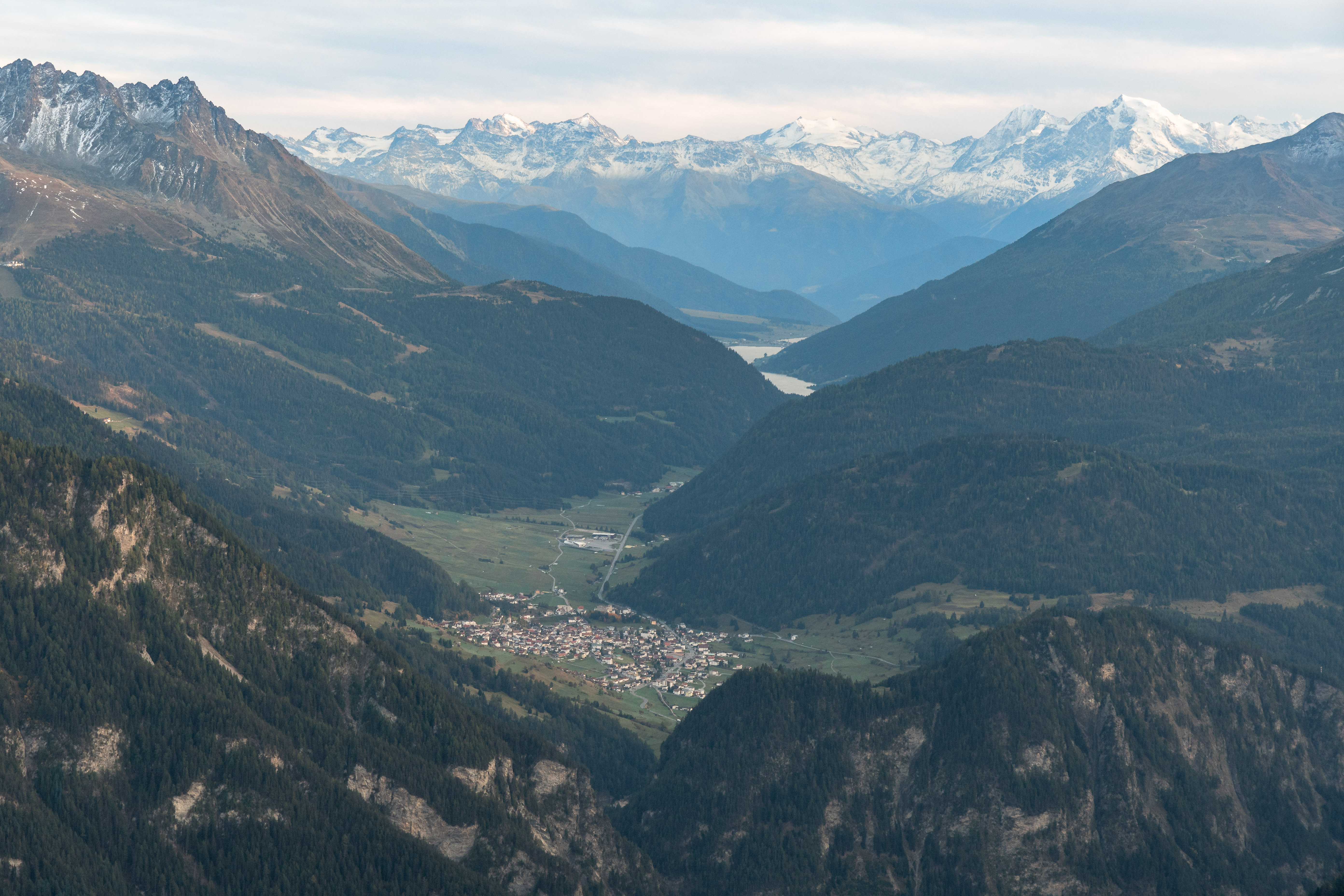 Nauders am Reschenpass mit Reschensee